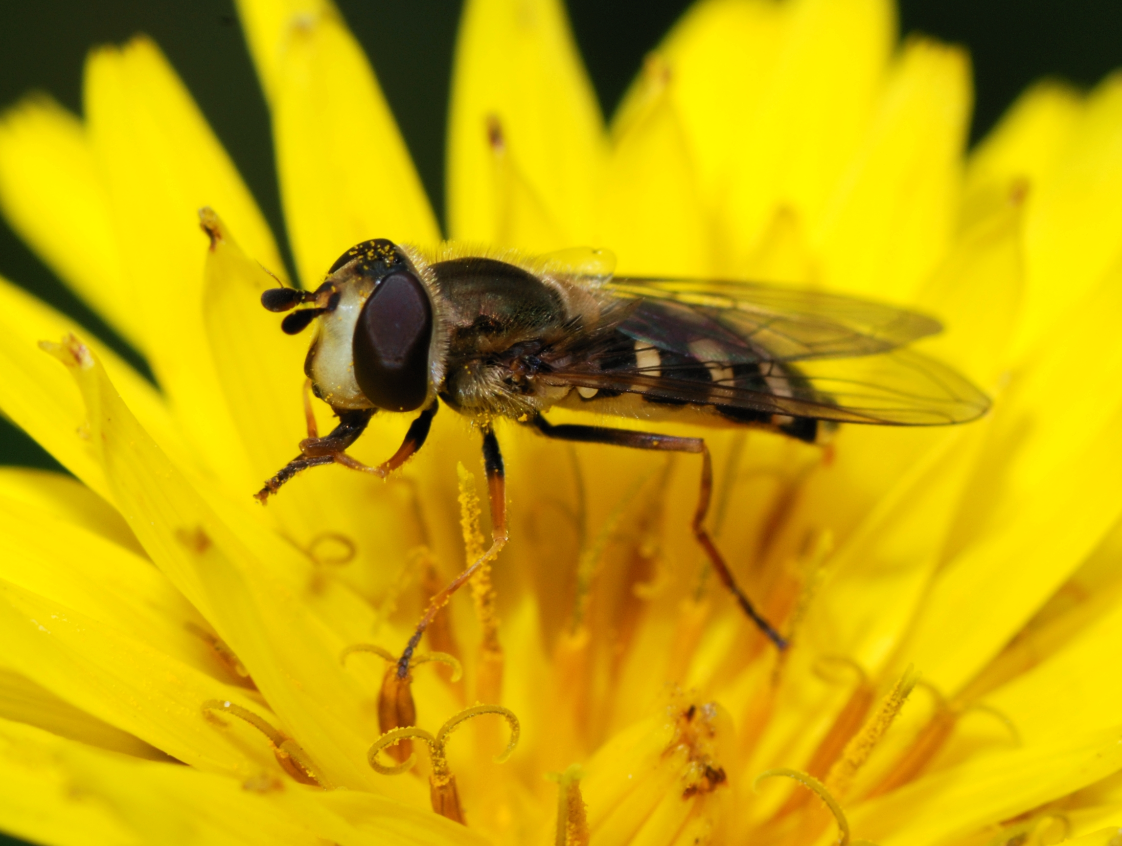 Female hoverfly (Eupeodes luniger)